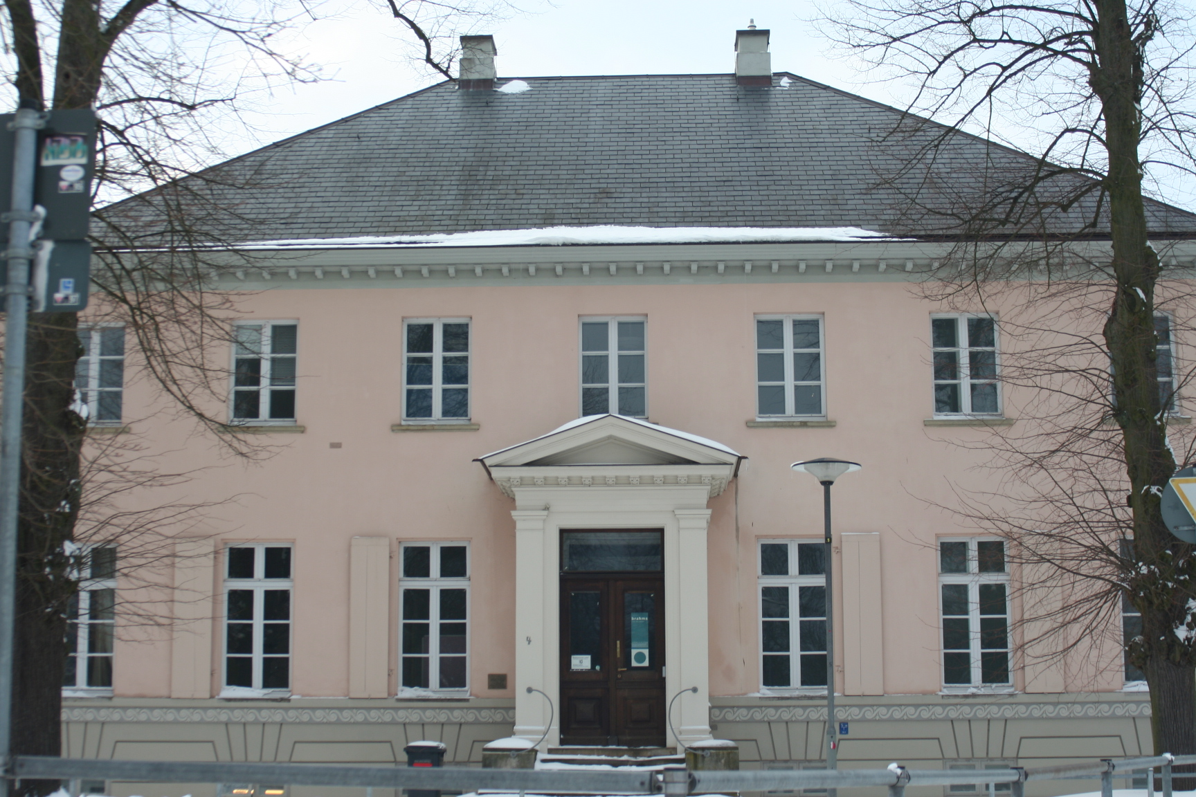 Eschenburg Villa in Lübeck, Frontseite, Sitz des Brahmsinstituts der Musikhochschule